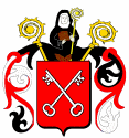 Armoiries de l'abbaye de Remiremont